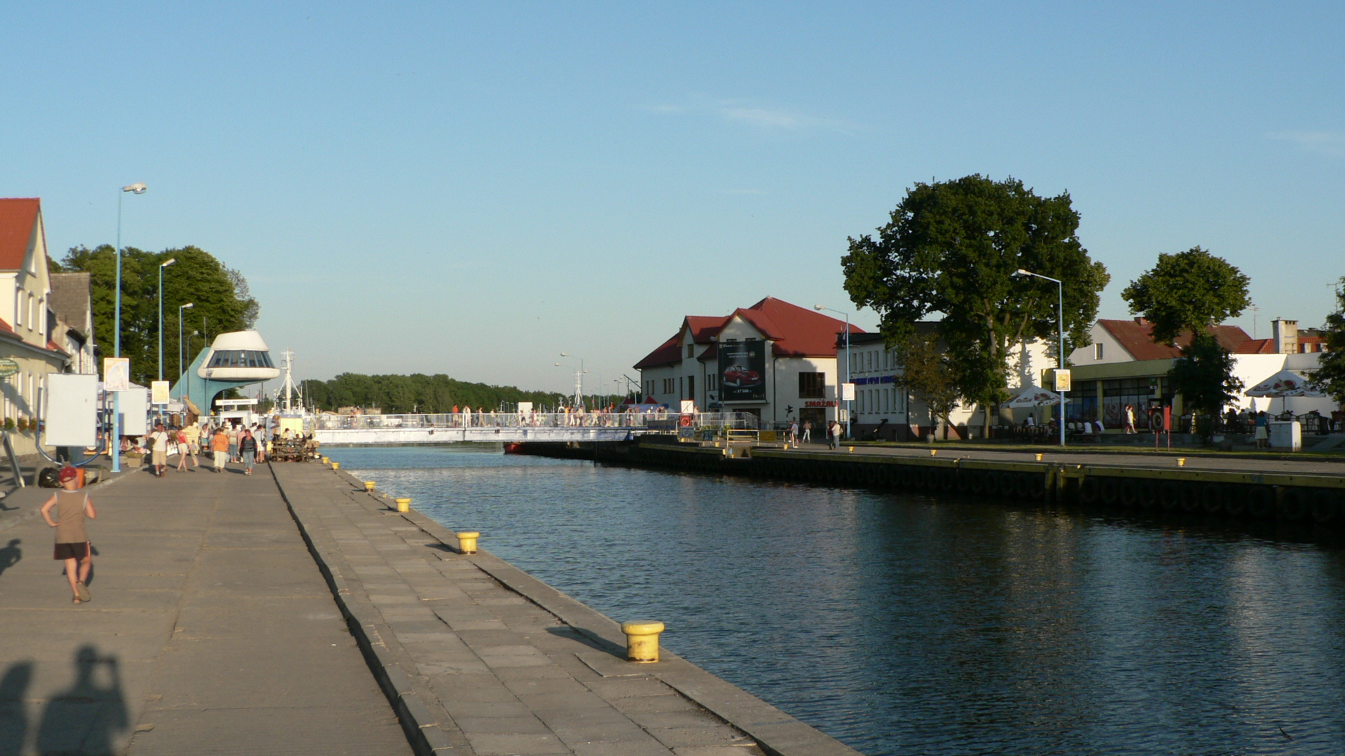 Rozsuwany most w Darłowie